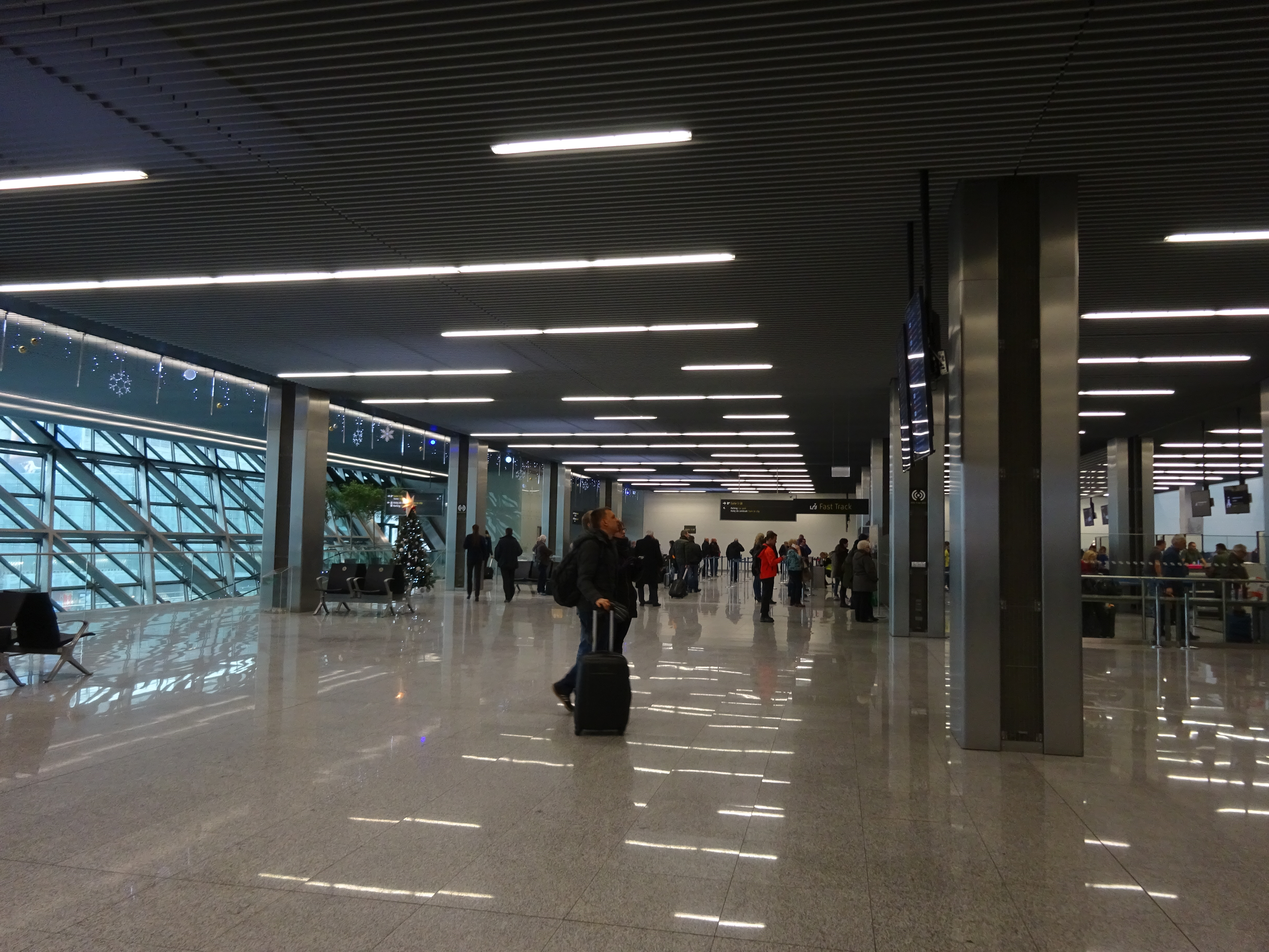 Port Lotniczy Kraków-Balice - wnętrze terminalu - górna płyta. Po remoncie, 2016